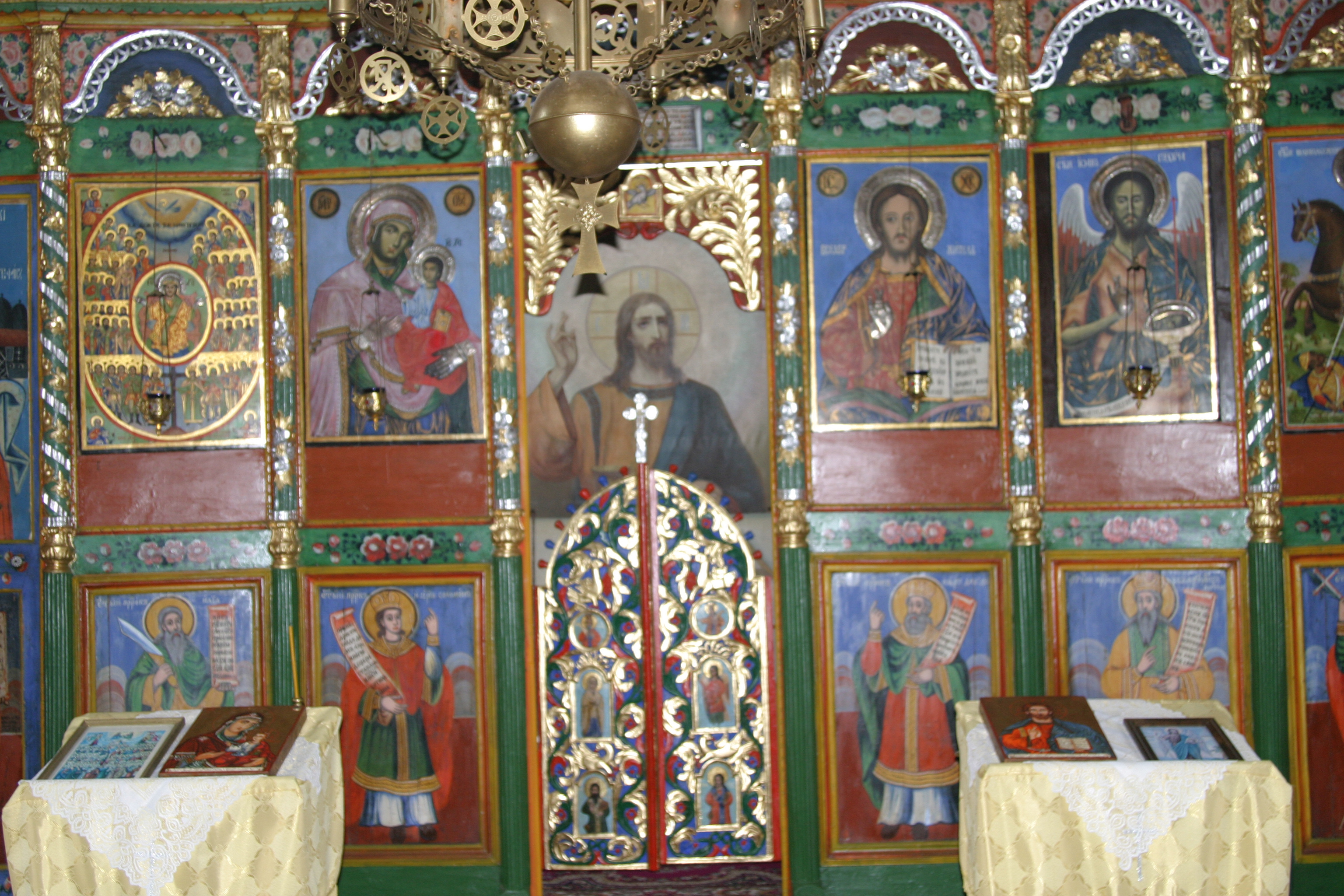 Иконостасът в църквата "Вси светии" в село Мрамор, Софийско.